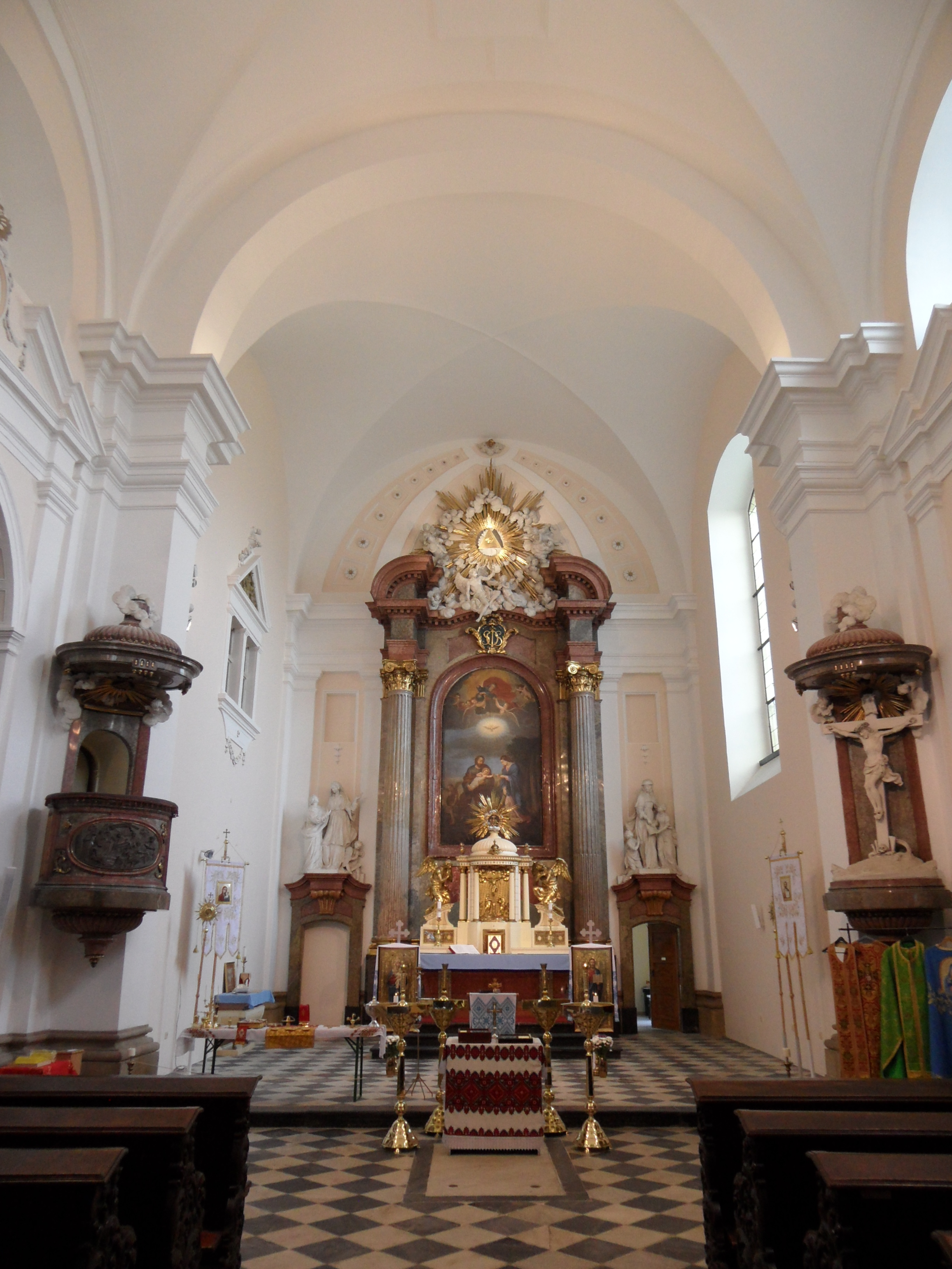 Interiér kostela sv. Josefa v Brně se sochařskou výzdobou Ondřeje Schweigla (1803–1804)